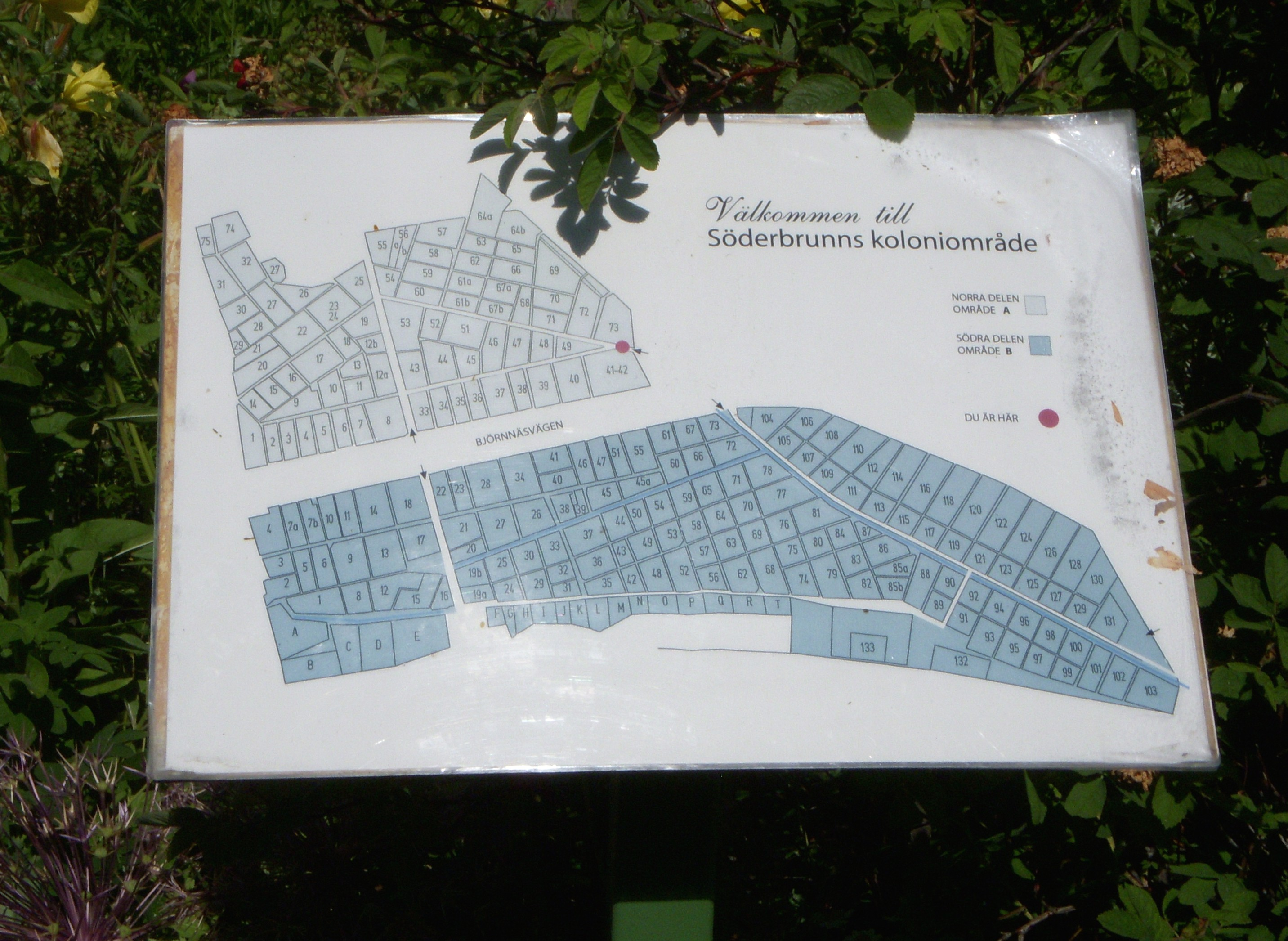 Koloniföreningen Söderbrunn på Norra Djurgården, Stockholm